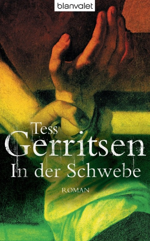 Tess Gerritsen: In der Schwebe. Blanvalet, München 2001. DNB